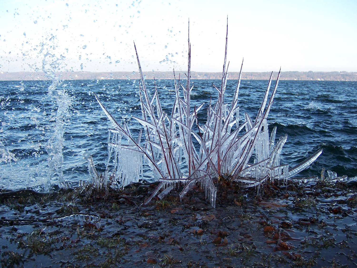 Durch Spritzwasser vereiste Pflanze am Starnberger See, nähe Garratshausen